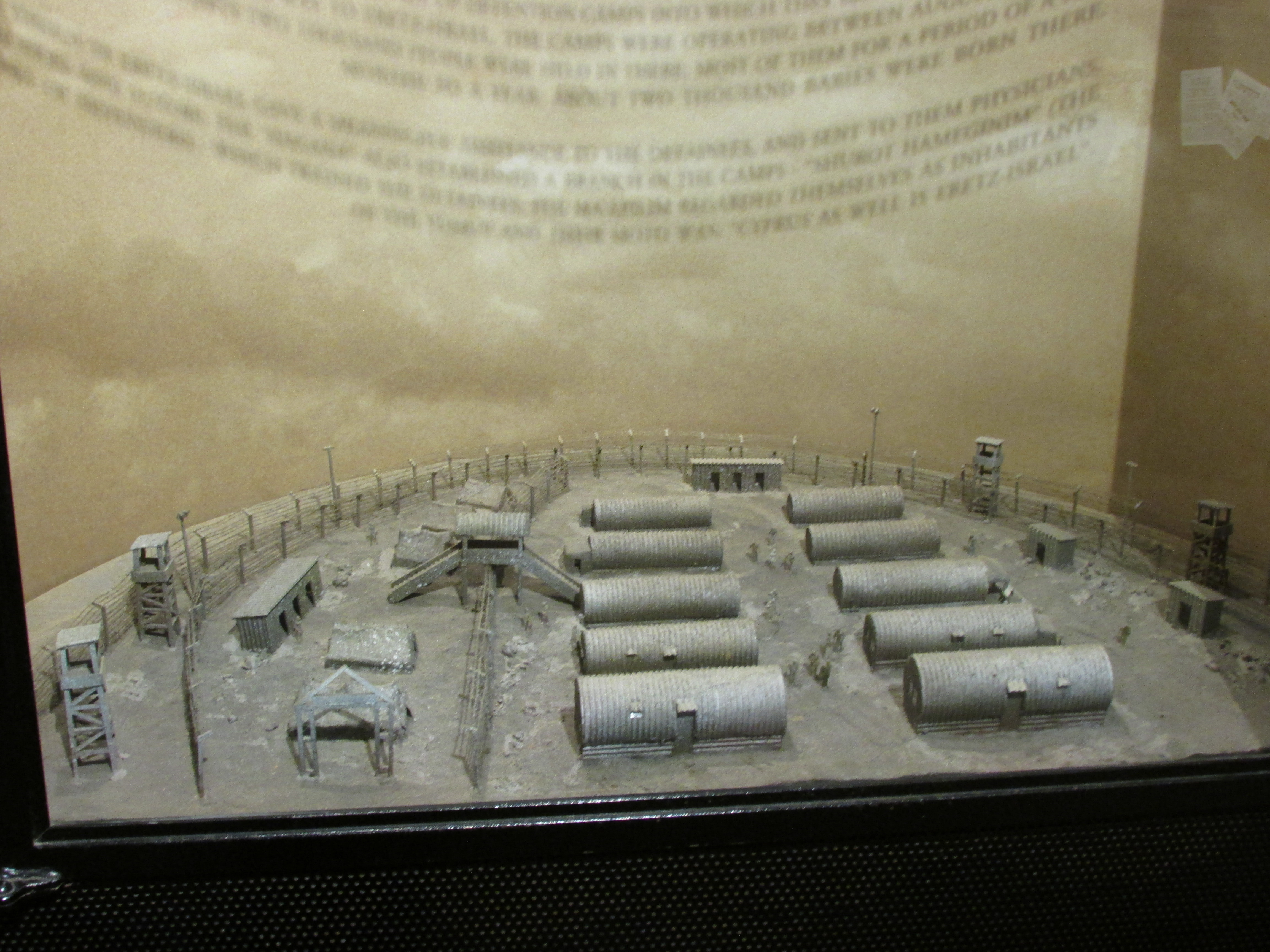 Display in Bet Eliyahu